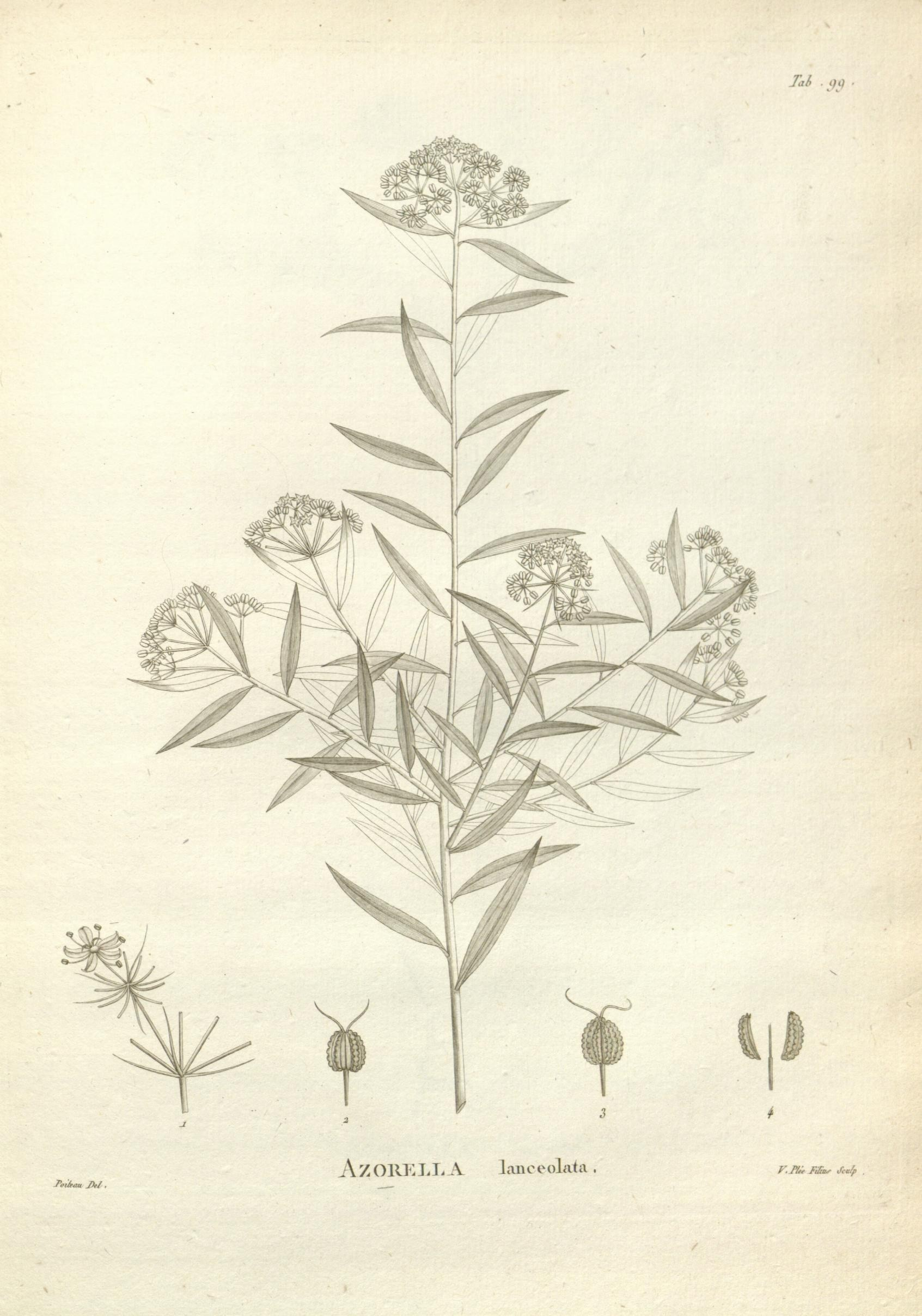 Platysace lanceolata (Labill.) Druce as AZORELLA lanceolata (Labill.)